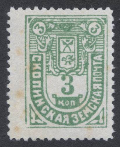 Земская марка. Скопинский уезд № 10 (1910 г.)